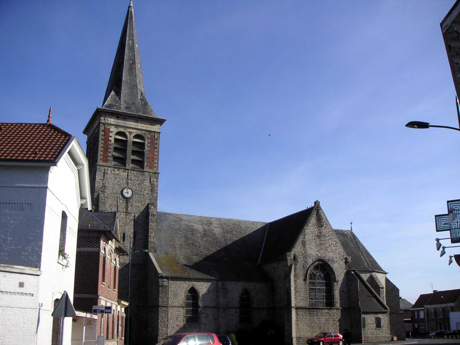 Vue de l'église romane d'Arleux (Nord) Padawane